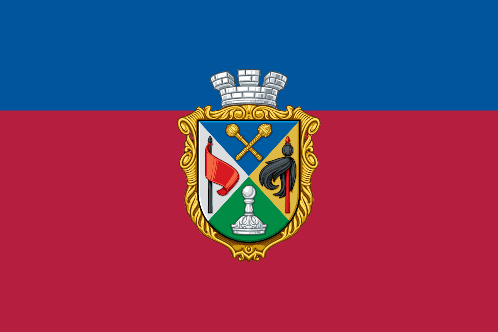 Флаг Глухова